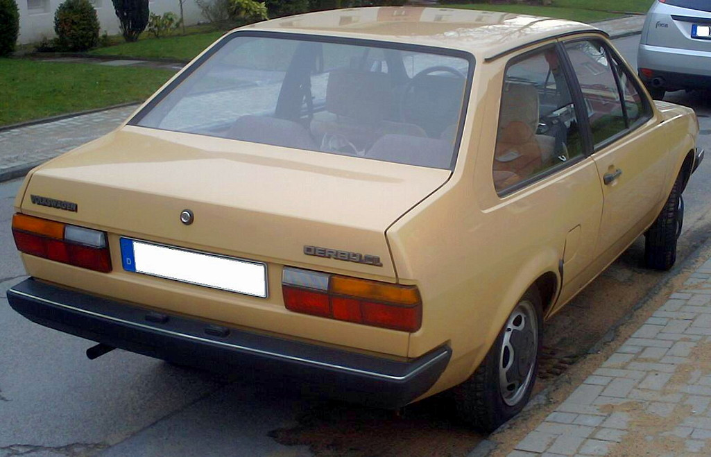 VW Derby CL